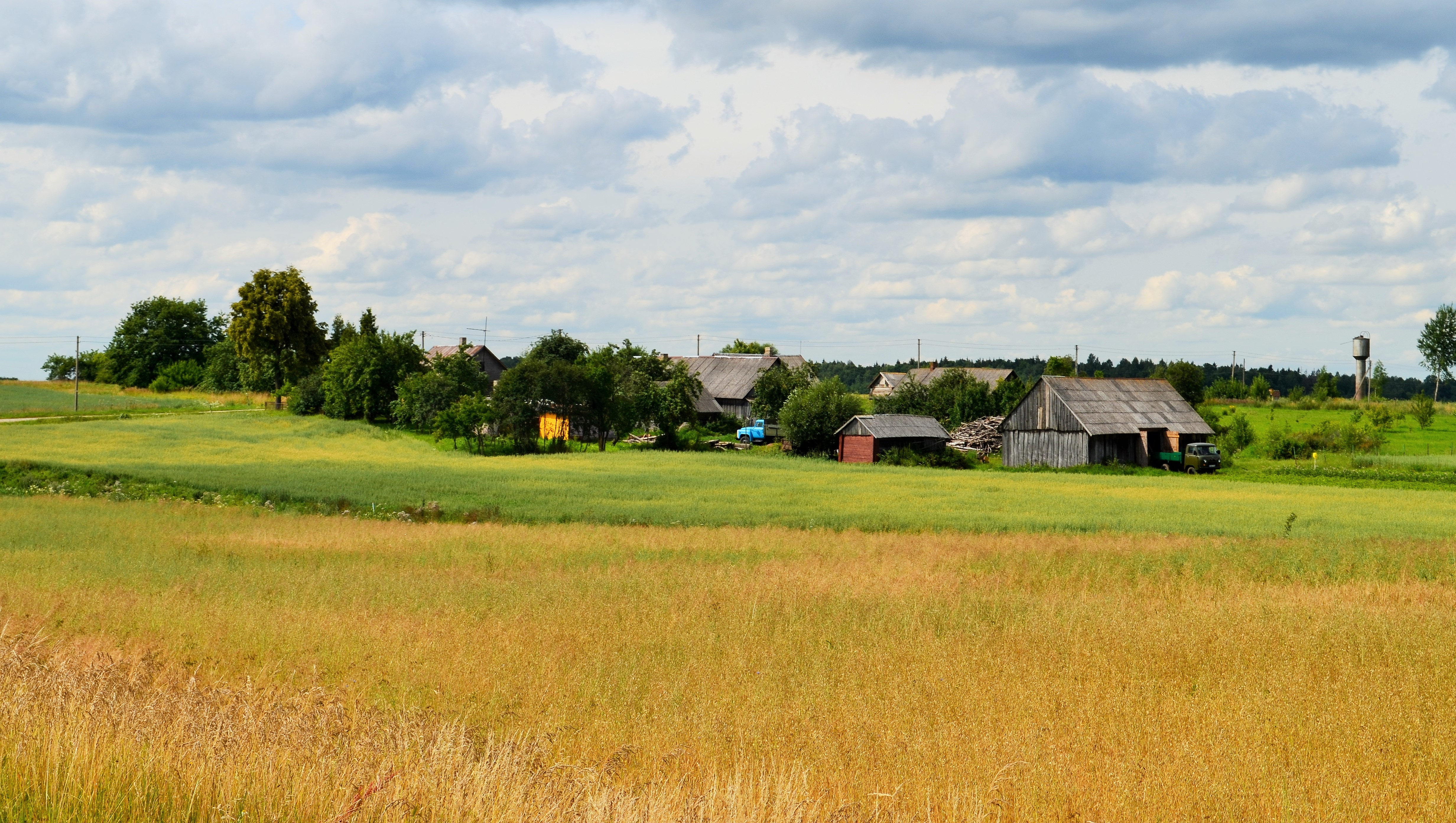 Reniūnai, Ukmergės raj.